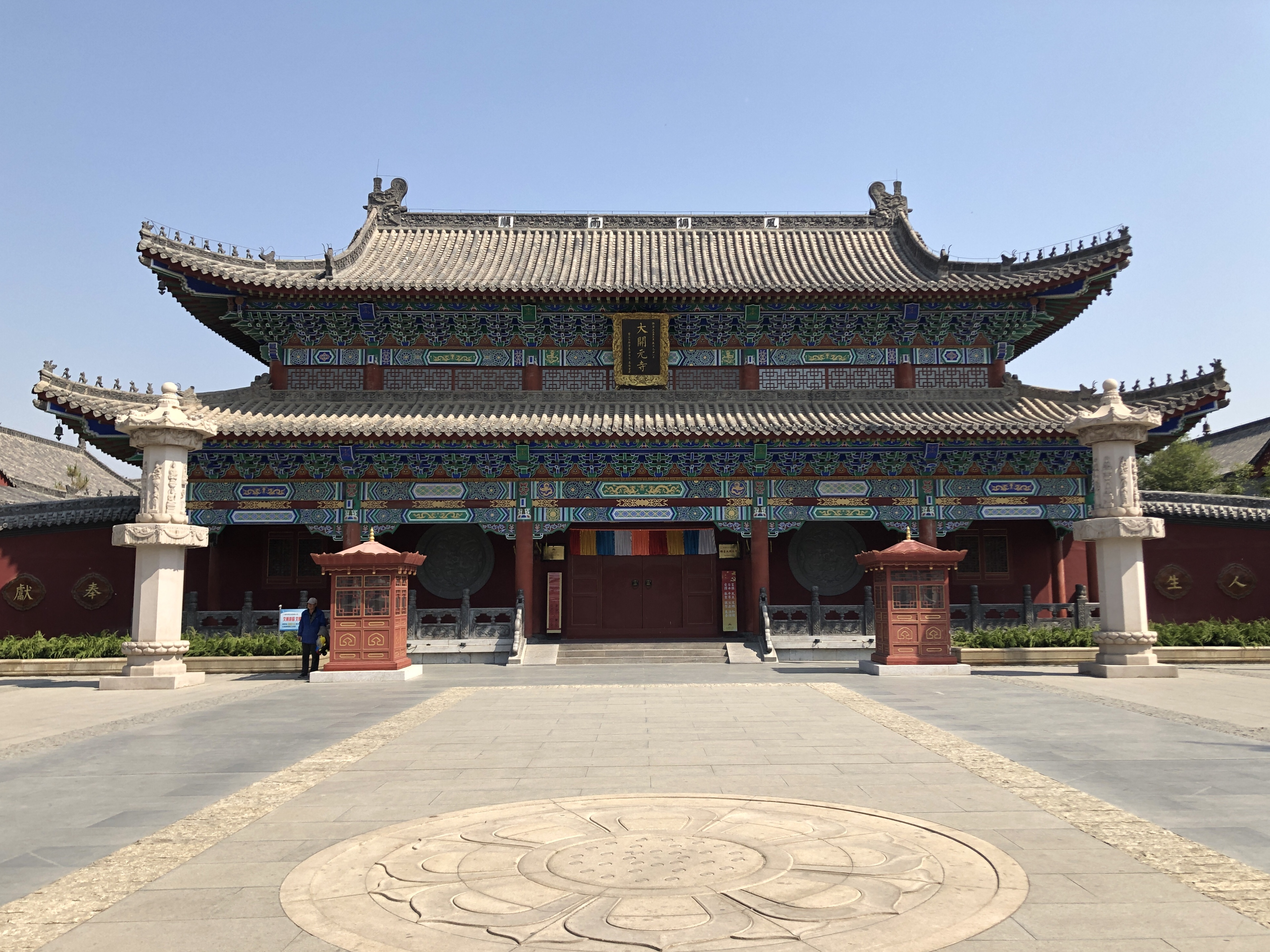 中文（中国大陆）: 邢台大开元寺南门